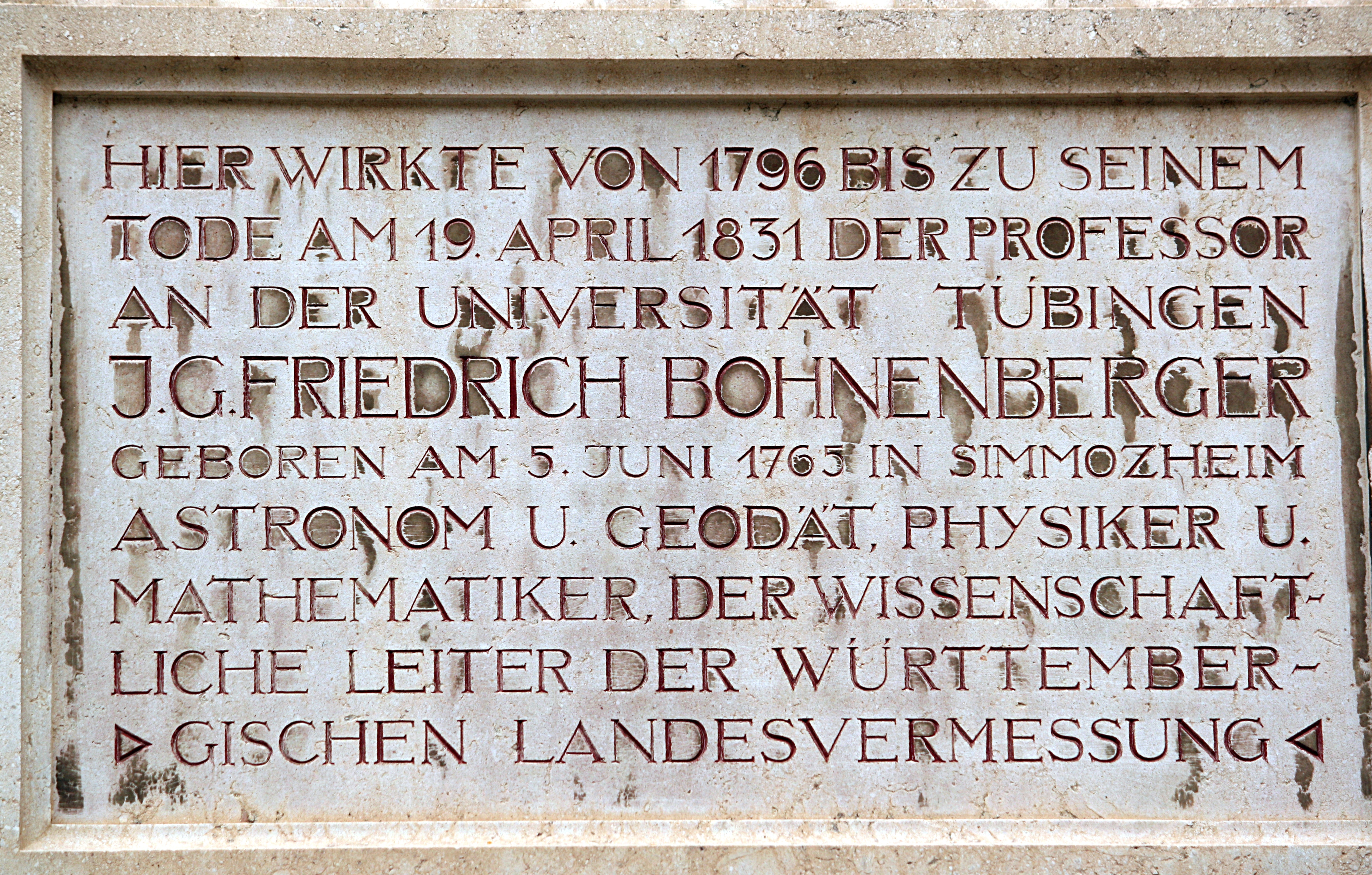 Tübingen, Schloss Hohentübingen, Tafel Bohnenberger